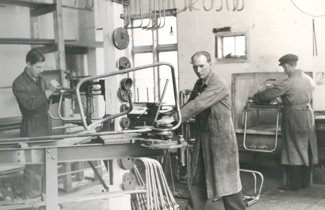 Billede fra produktionen da fabrikken var på Fjordgade i Aalborg - Start 40'erne